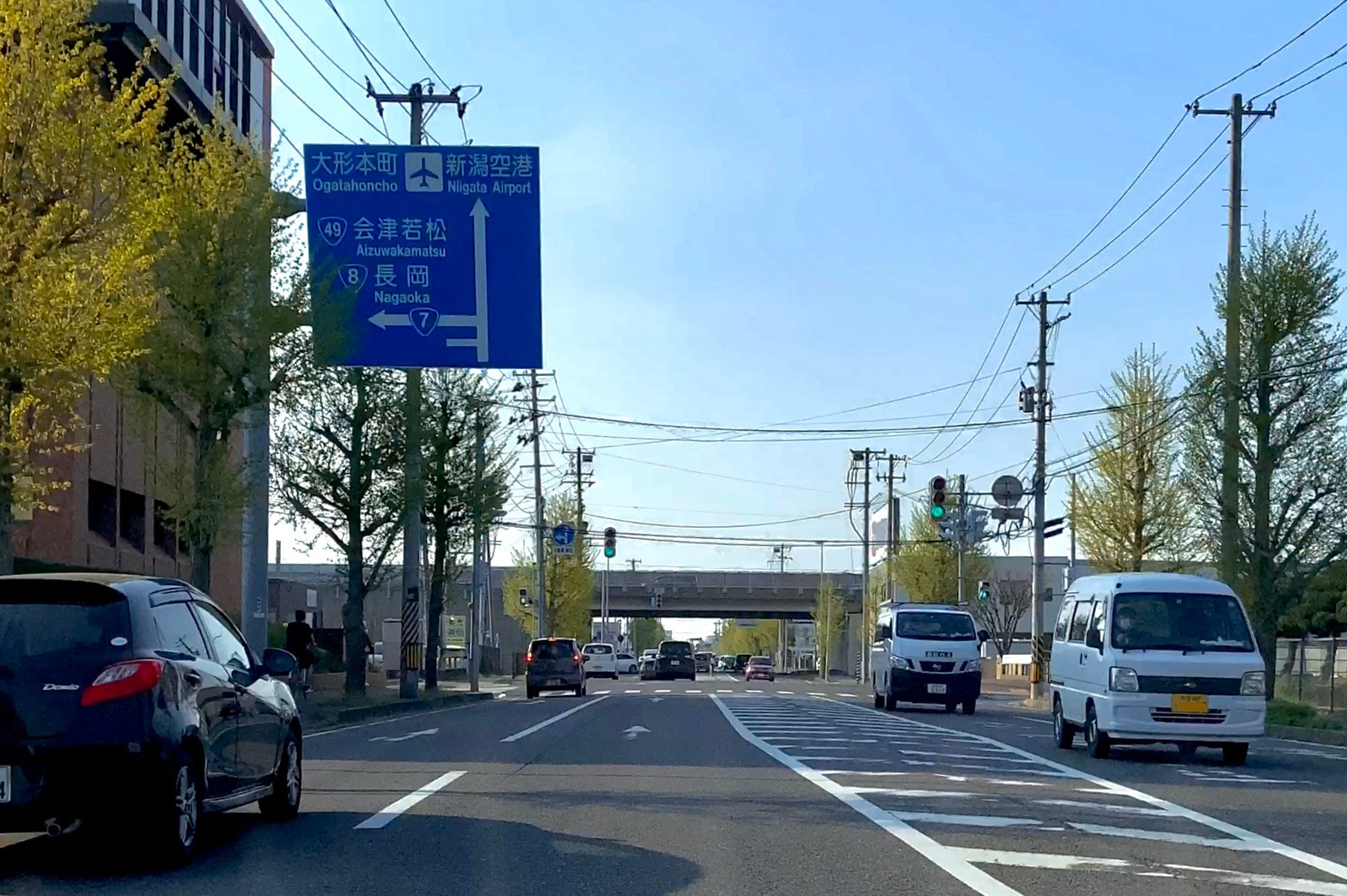 都市計画道路太平大渕線 逢谷内IC（新潟市東区，2020年4月）